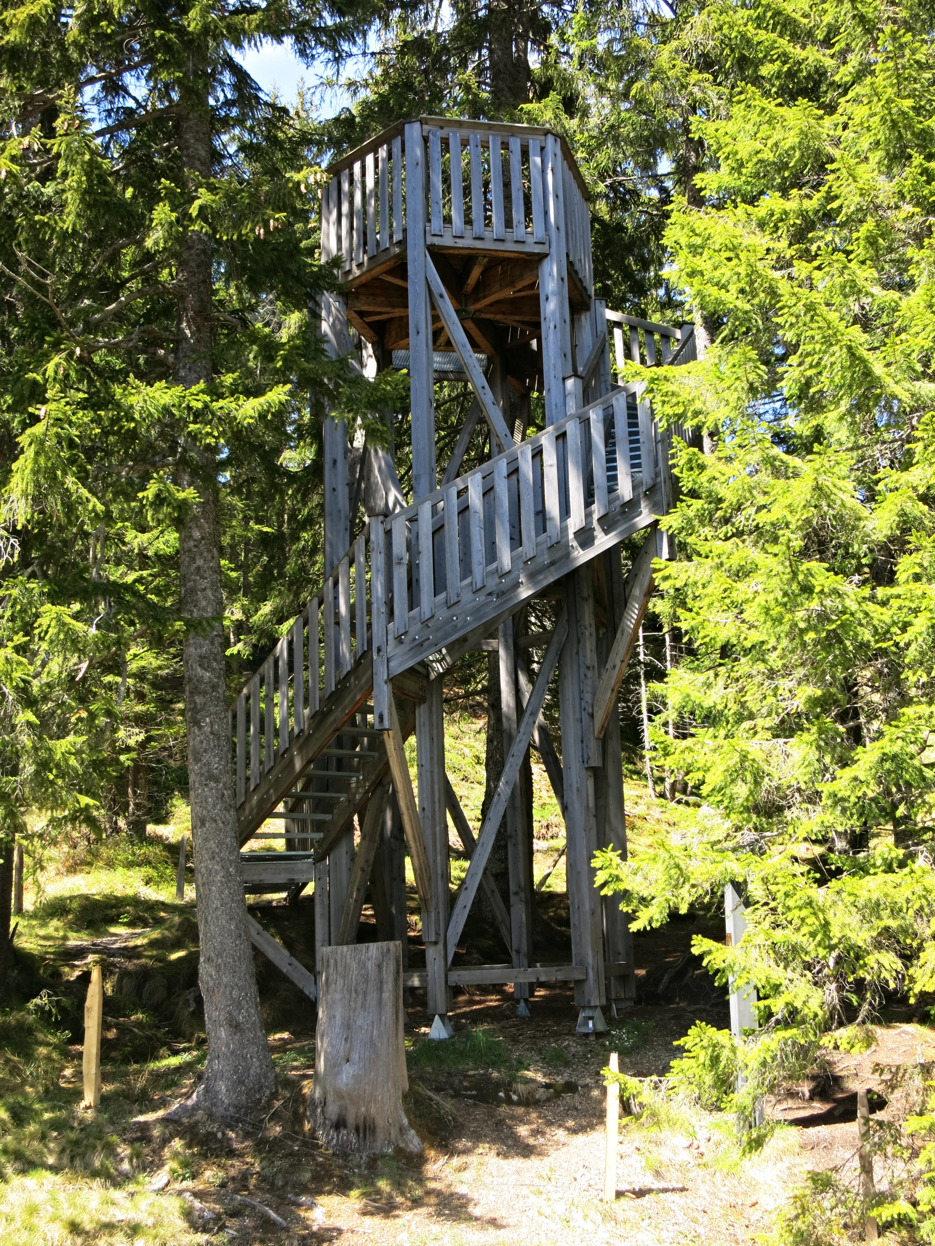 Bäerenturm auf Glaubenberg-Langis bei Sarnen